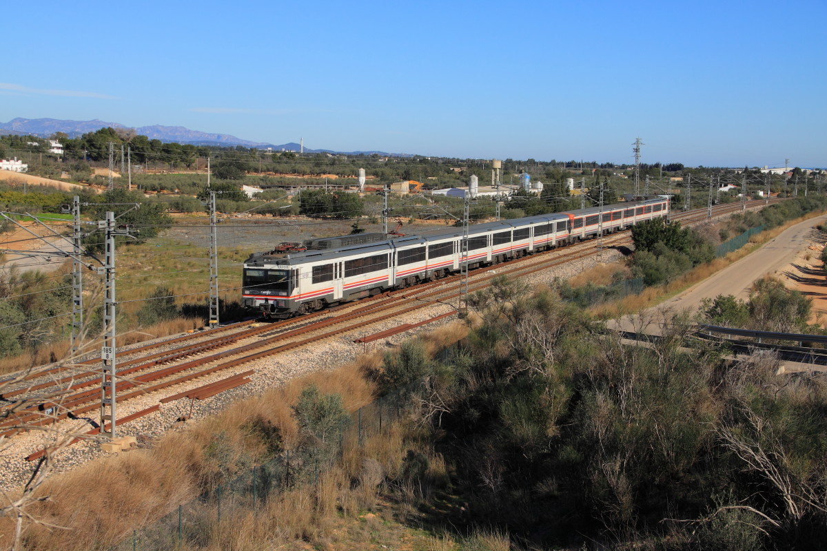 Un doble automotor eléctrico de la serie 470 de Renfe Operadora, en mando múltiple, que realiza el servicio Regional Exprés Barcelona Estació de França - Tortosa, llegando a la estación de L'Aldea - Amposta - Tortosa (Baix Ebre, Tarragona, Catalunya).